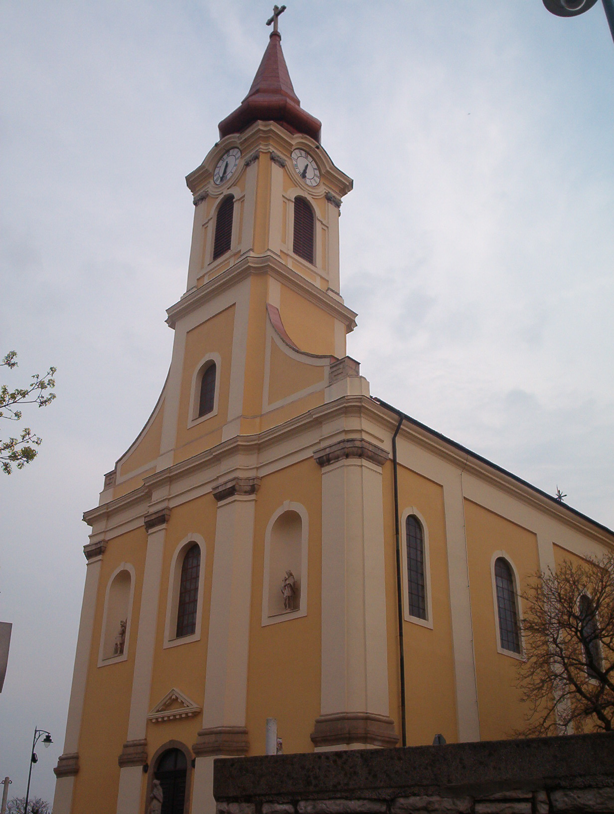 A várpalotai Nagyboldogasszony római katolikus templom